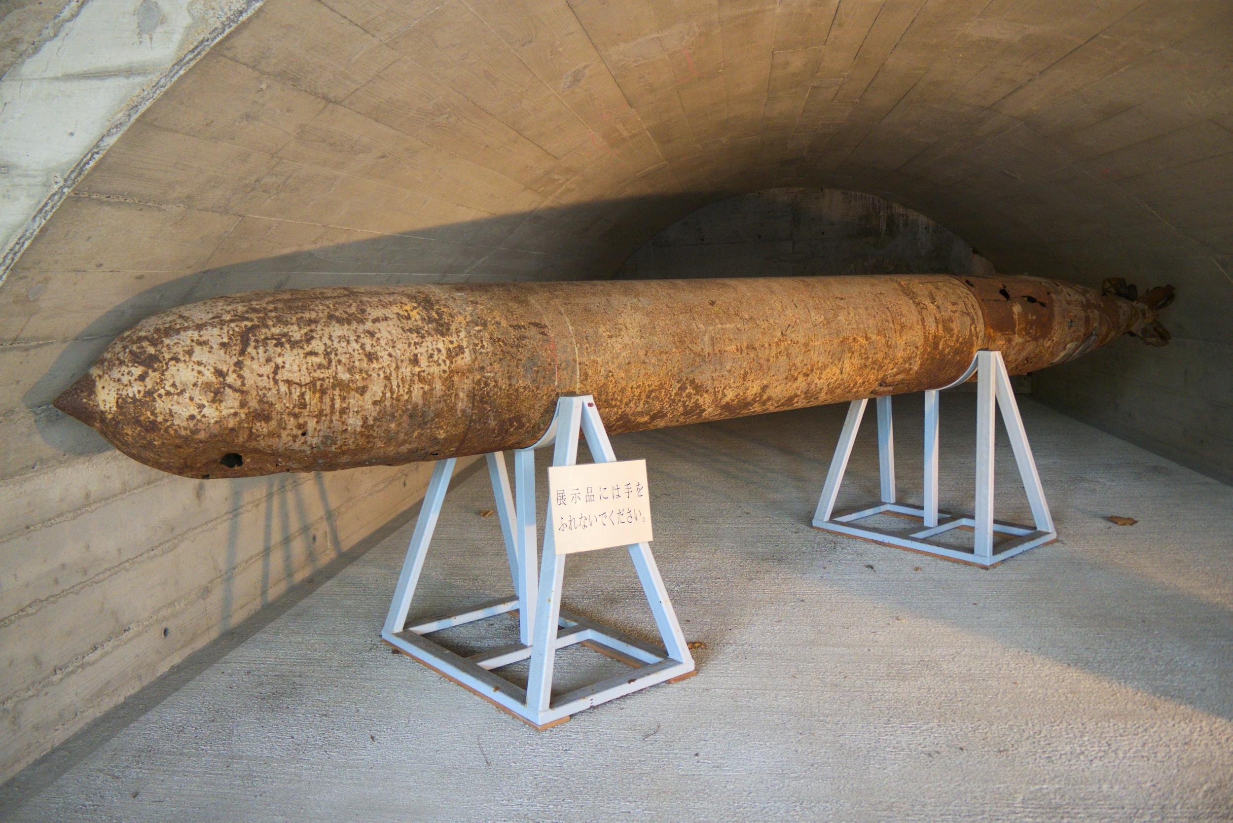 住吉トンネル工場跡に展示されている91式航空魚雷の実物（長崎県長崎市）。長与町の長与中学校敷地から掘り出され、福済寺に展示されていたもの。